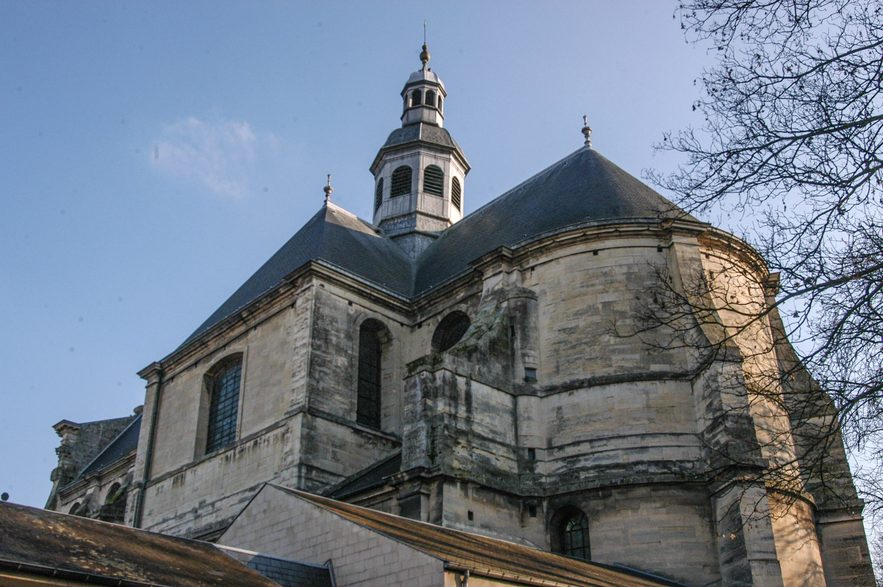 Église Notre-Dame-de-la-Gloriette Caen